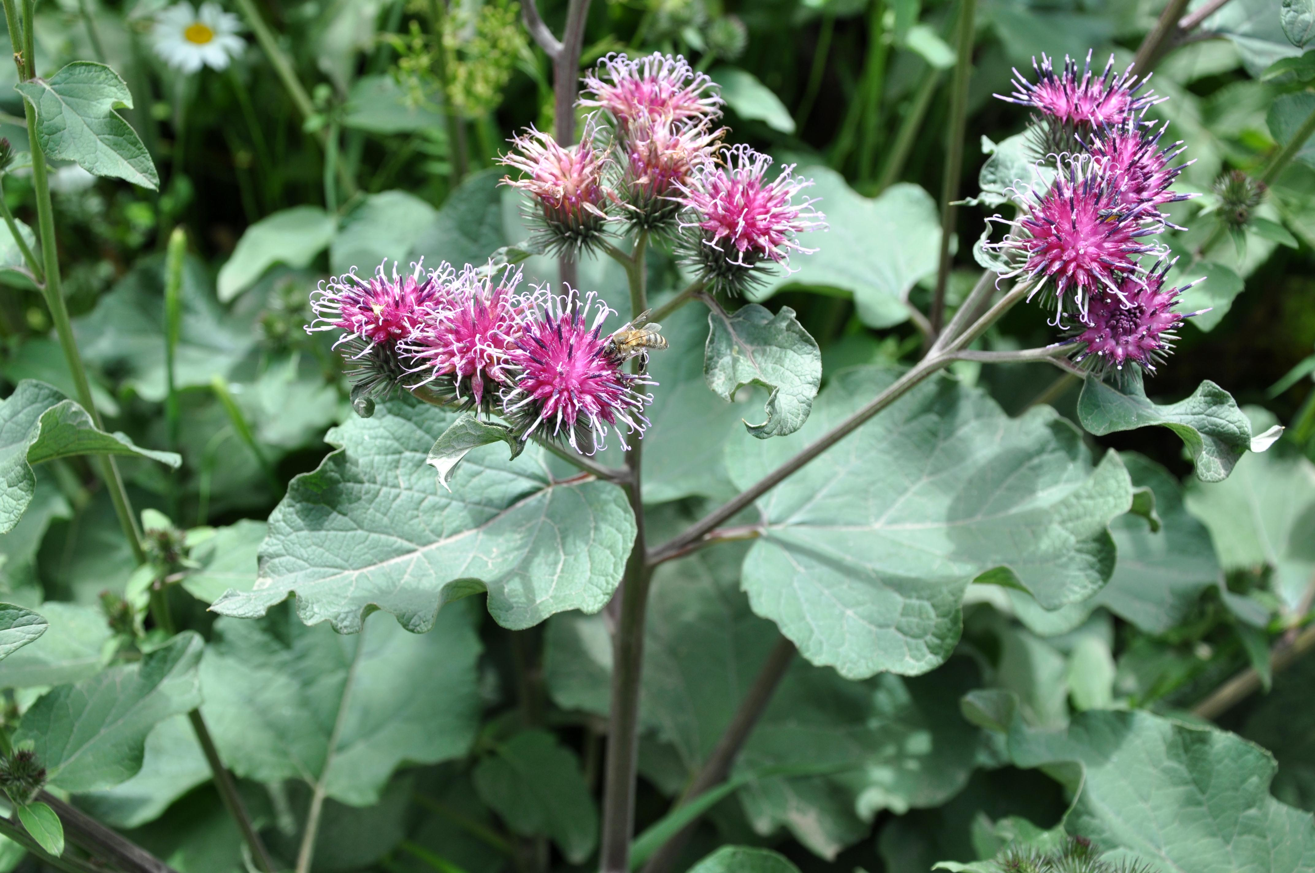 გადაღებულია შქმერში Taken in Shkmeri